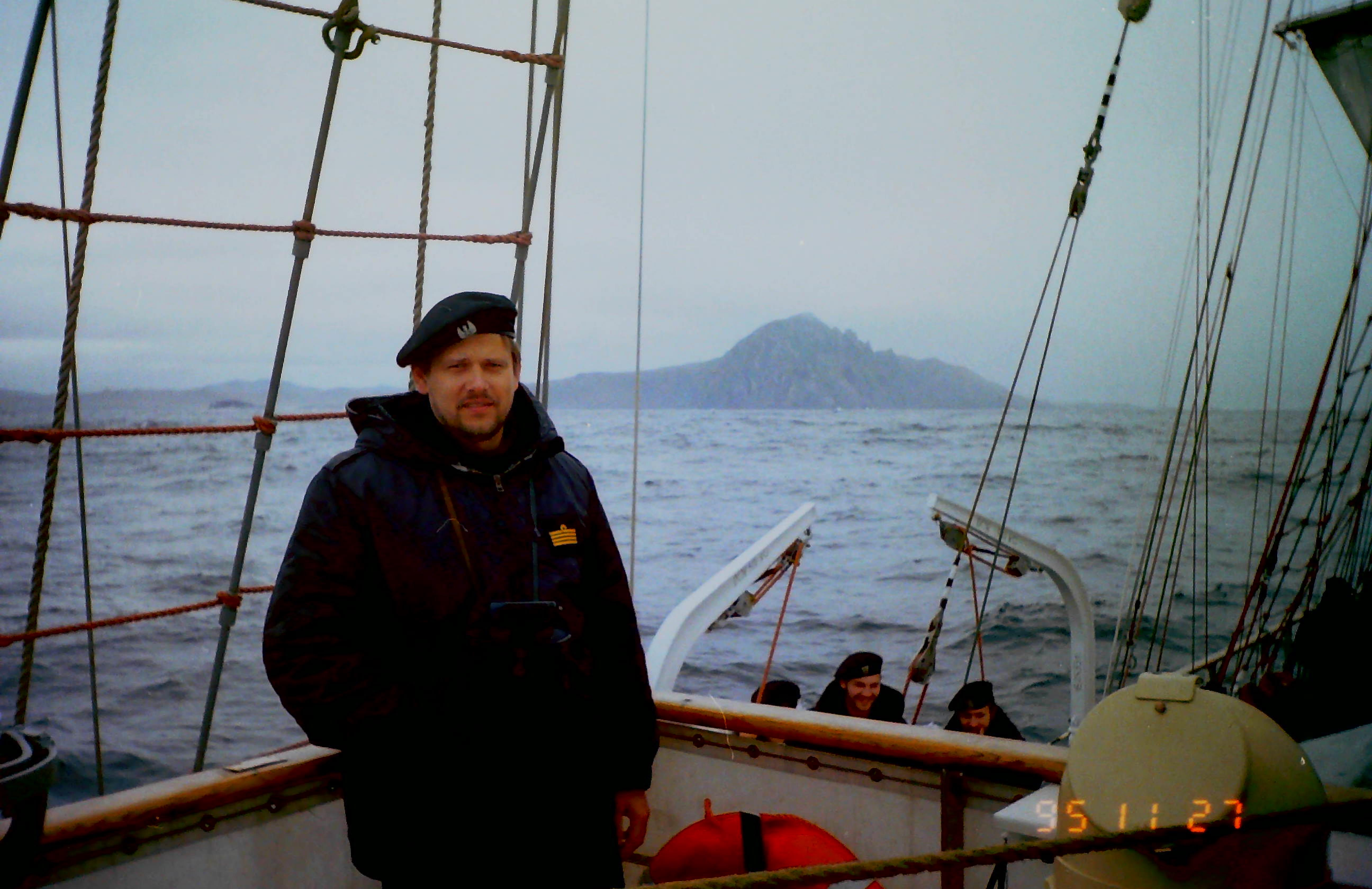 Kpt.mar Mariusz Mięsikowski w rejsie dookoła świata na ORP Iskra podczas pełnienia wachty morskiej.